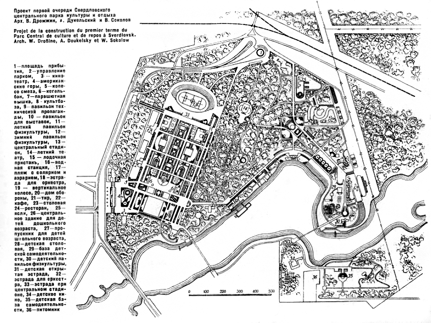 Иллюстрация из журнала "Архитектура СССР", №5, 1934г.